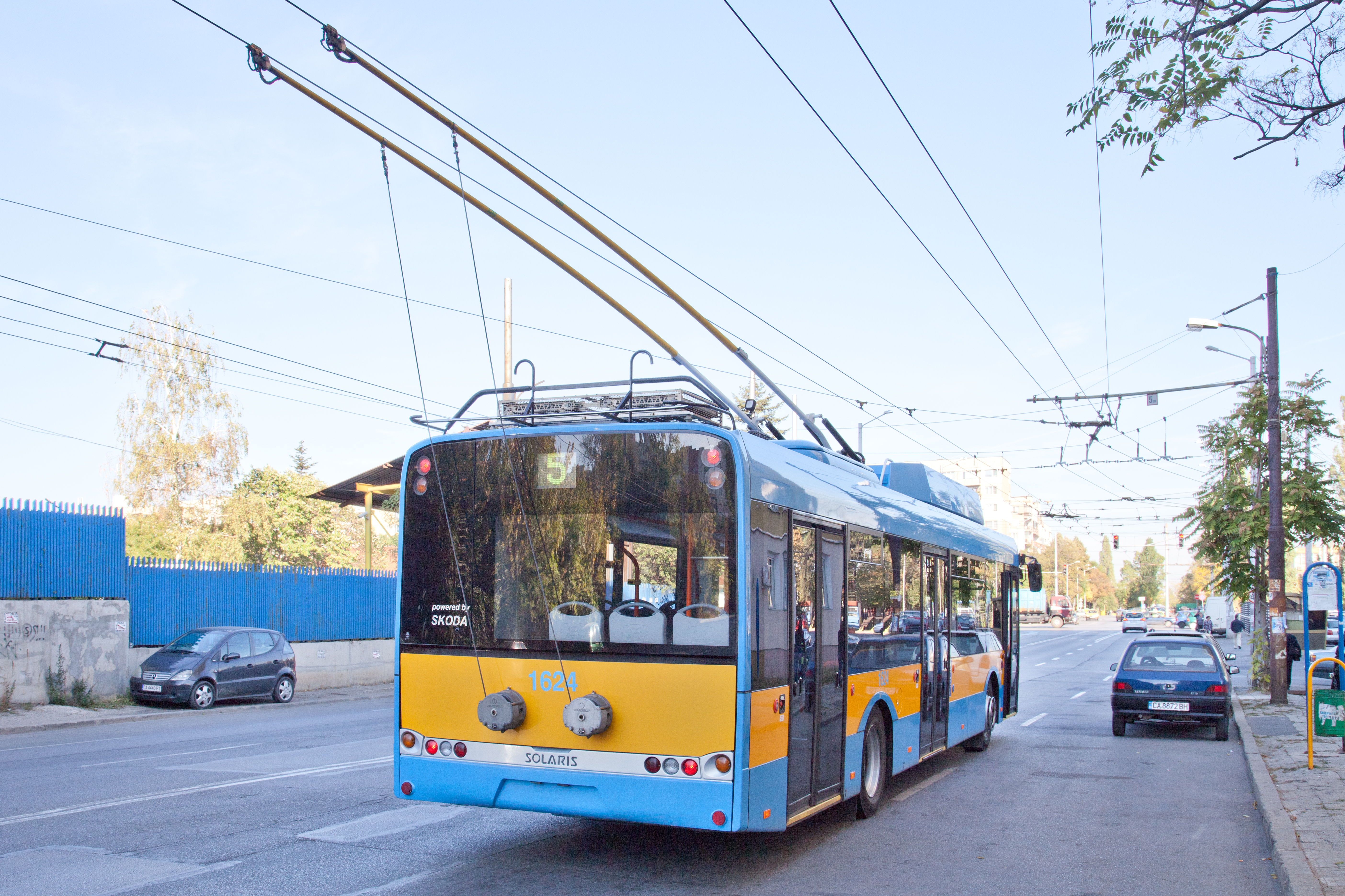 Trolleybus-Depot Nadeschda in Banischora, Sofia